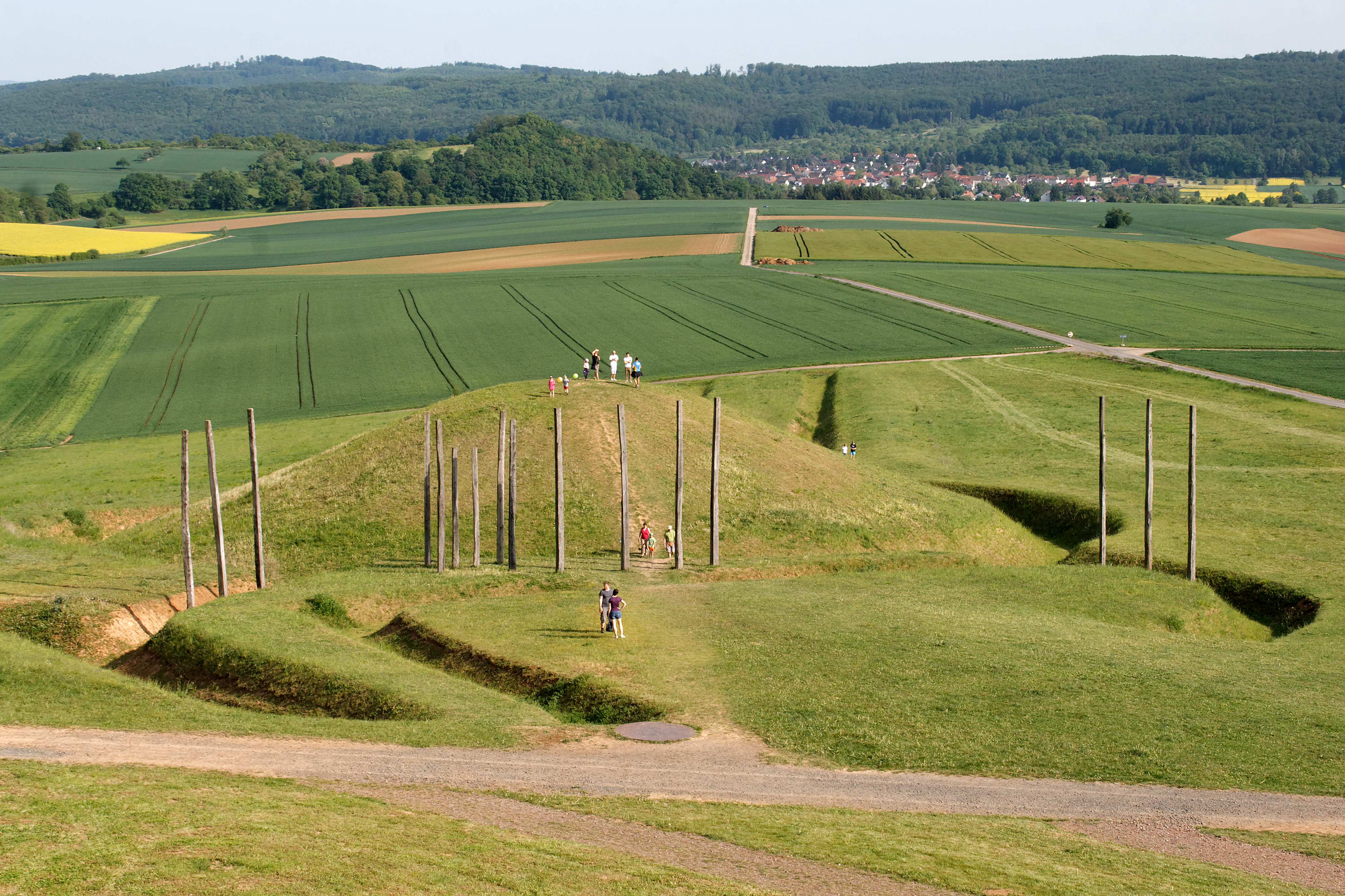 Keltischer Grabhügel auf dem Glauberg in Hessen mit Grabensystem und Kalendarium aus 16 Holzpfählen. Diese rekonstruierten Anlagen sind Teil eines Archäologischen Parks am Museum Keltenwelt am Glauberg.